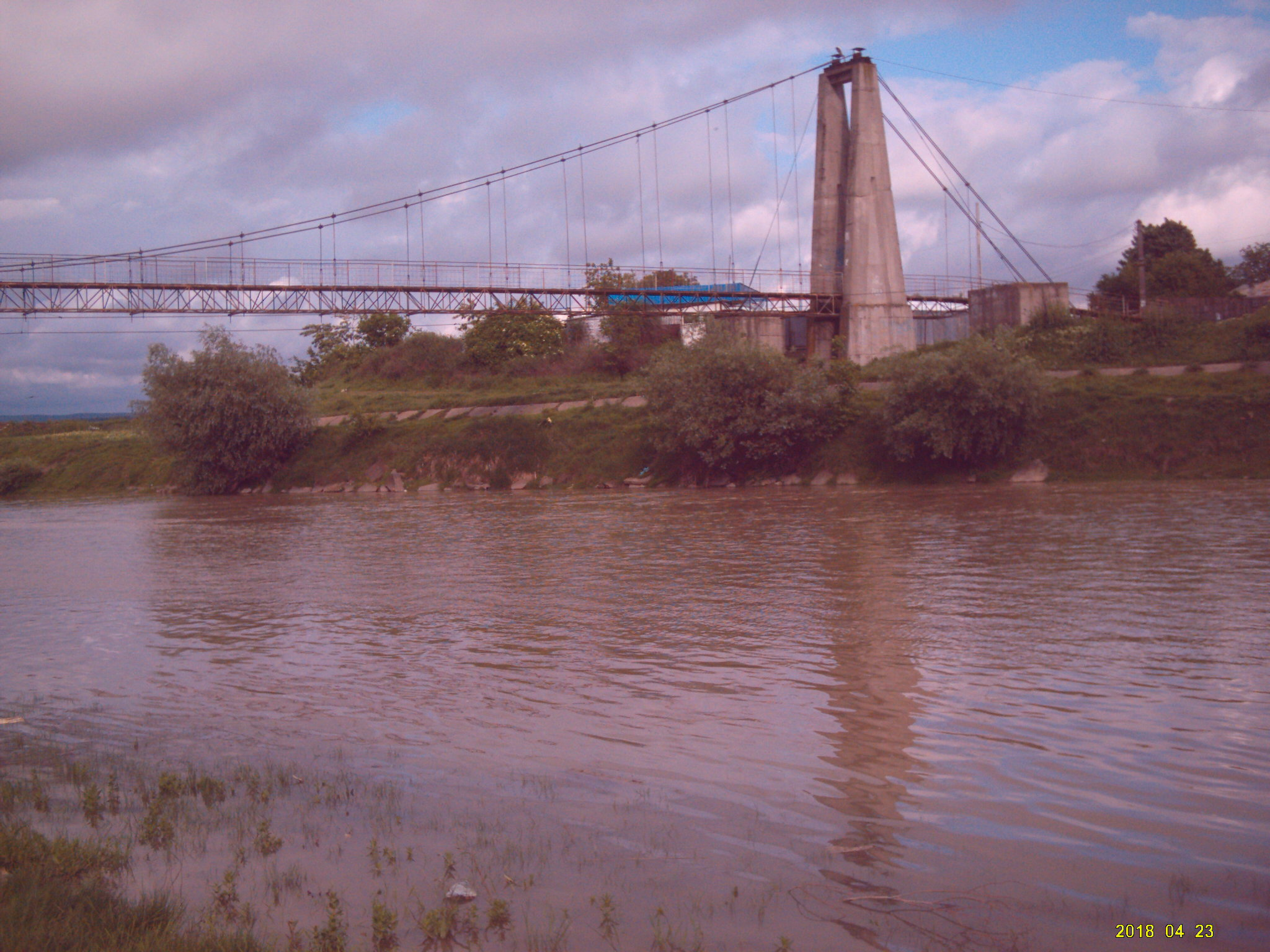 el puente sobre el rio Moldova entre Roman y Cotu Vameş